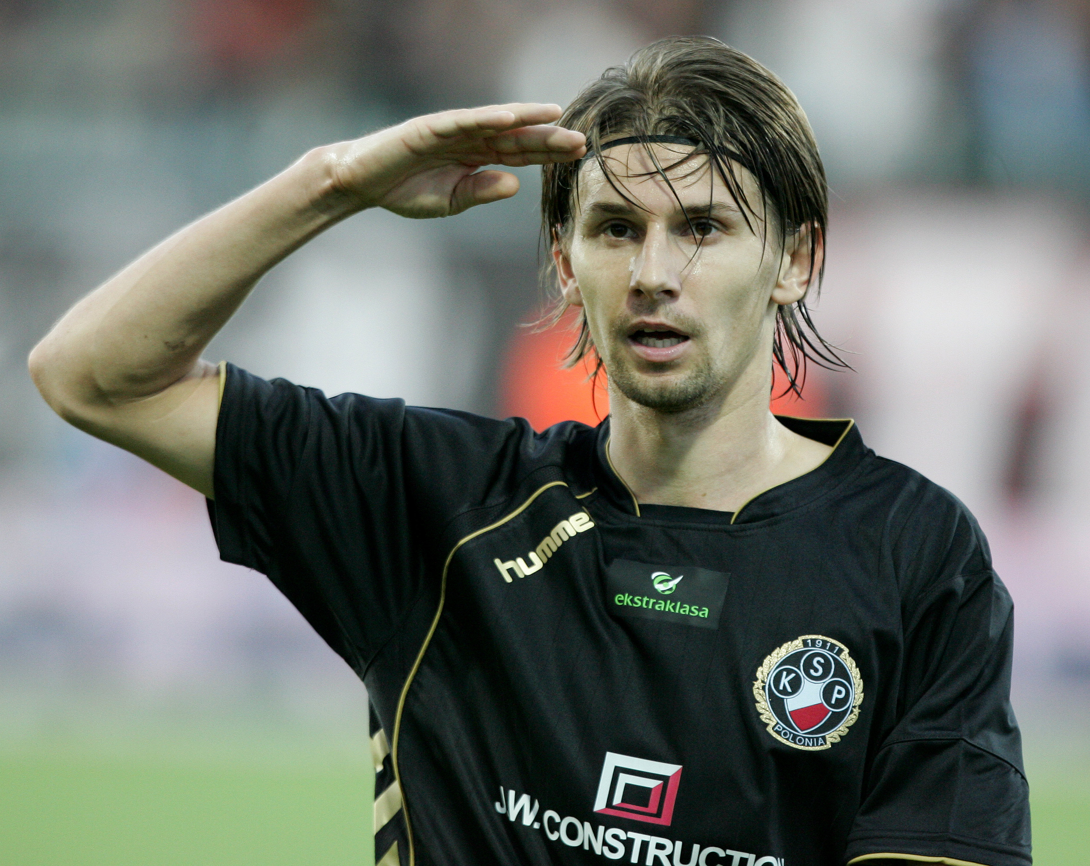 Euzebiusz Smolarek (2010)